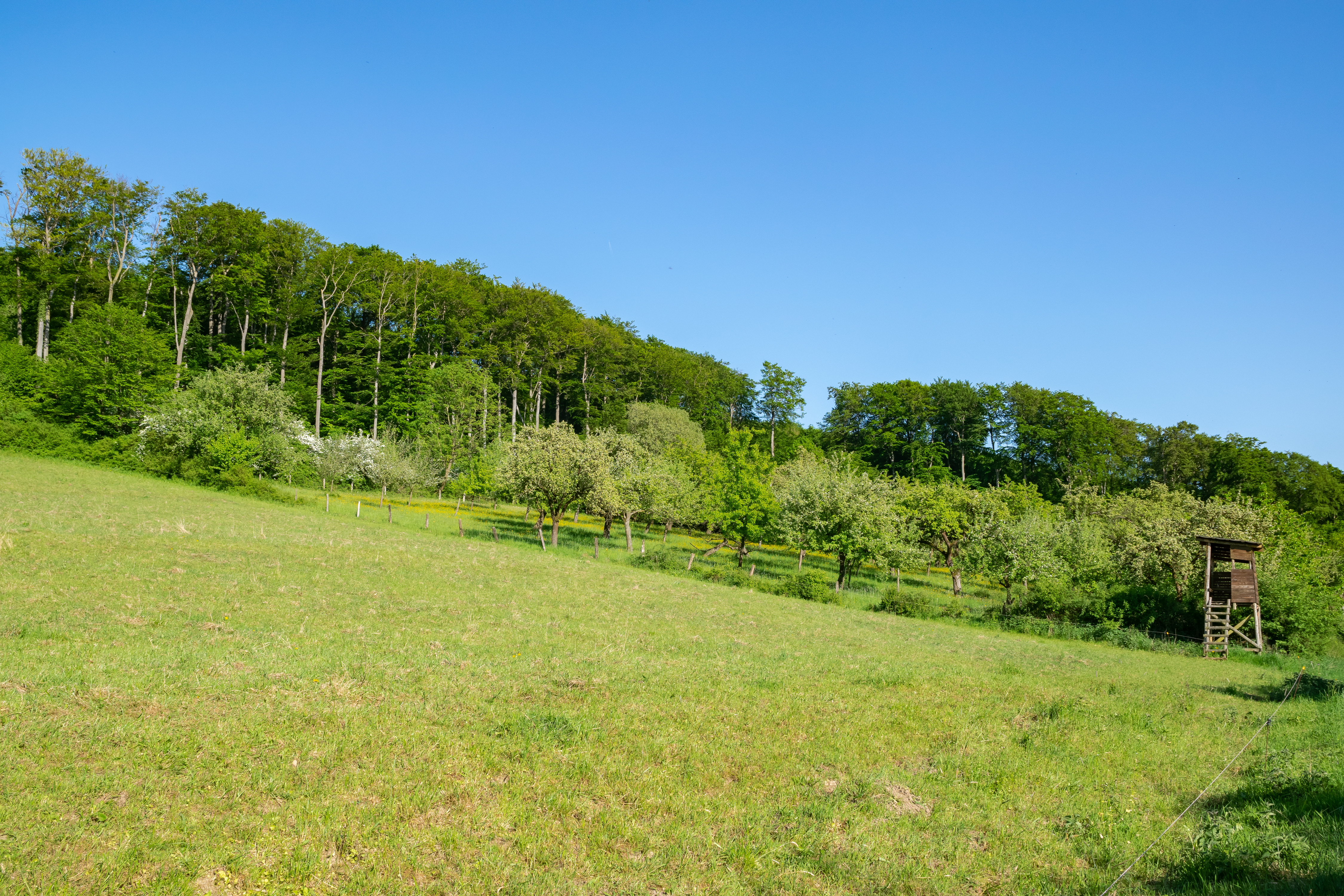 Naturschutzgebiet Gradberg, Bad Driburg, Kreis Höxter; Steinberg südlich Neuenheerse